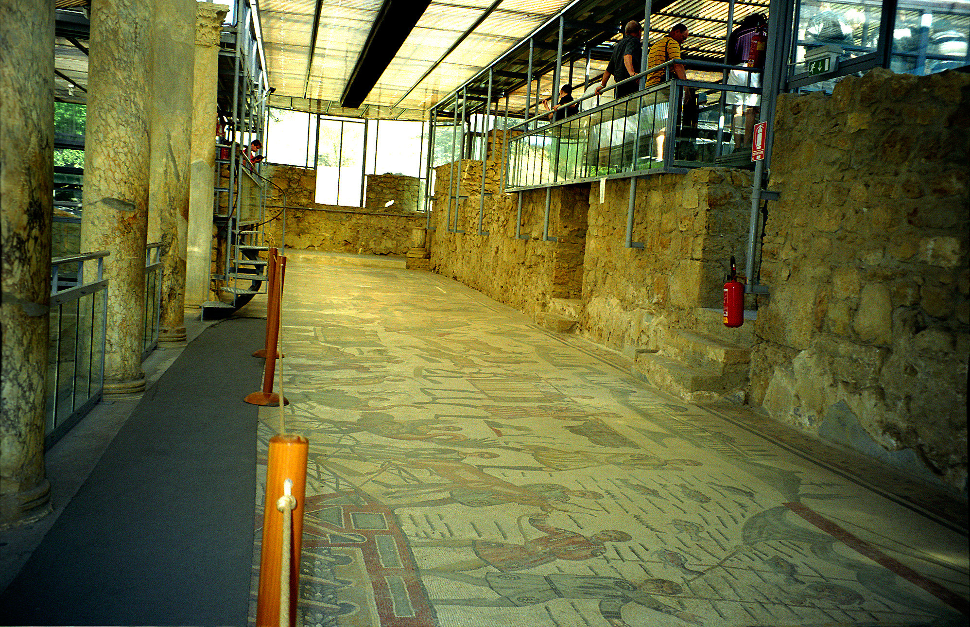 Sicily, Villa Romana del Casale